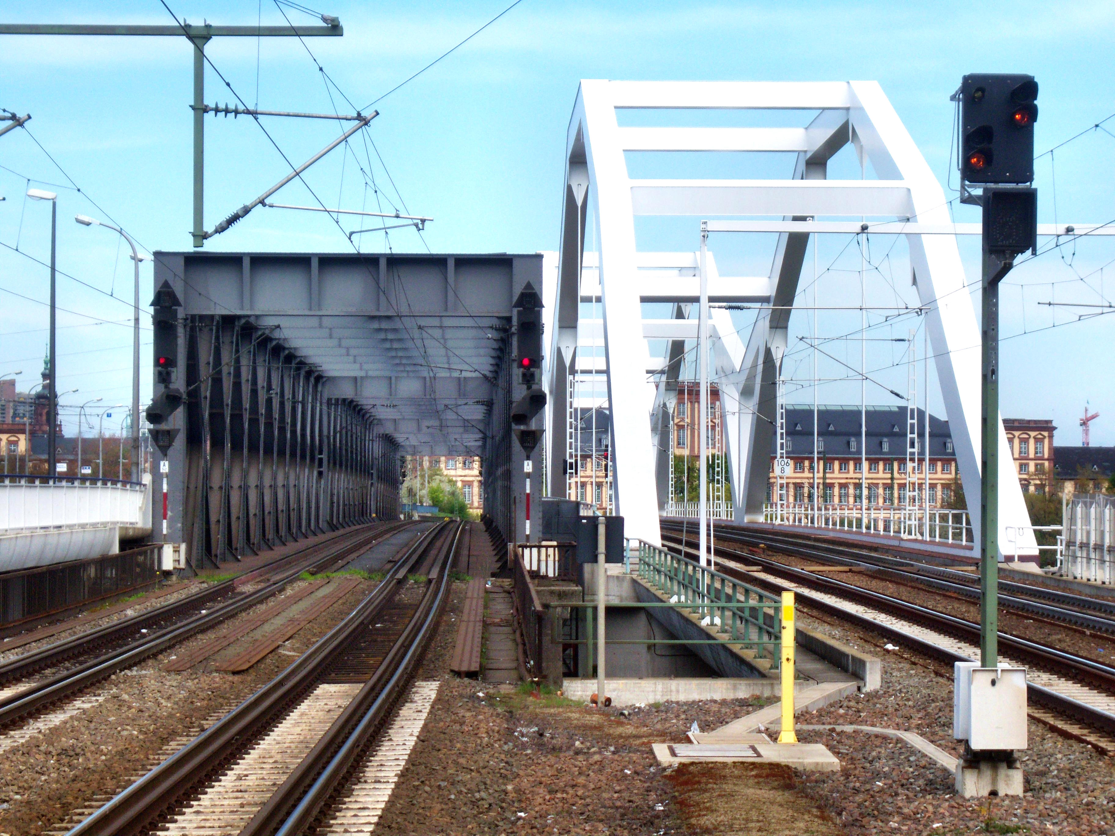 Die Eisenbahnbrücken der Konrad-Adenauer-Brücke zwischen Ludwigshafen am Rhein und Mannheim- links die alte, rechts die neu erbaute